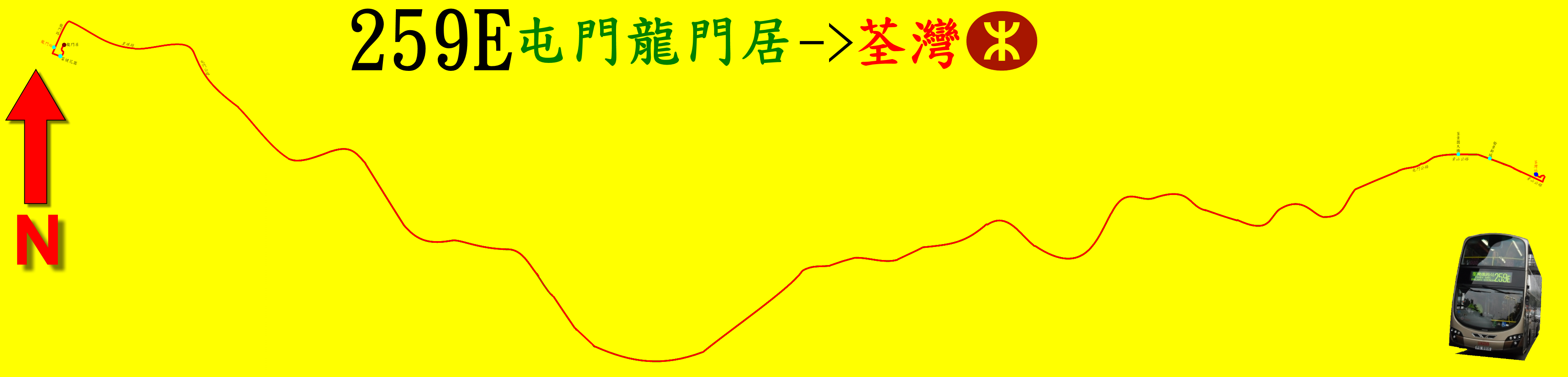 中文（香港）: 九巴259E線的走線圖